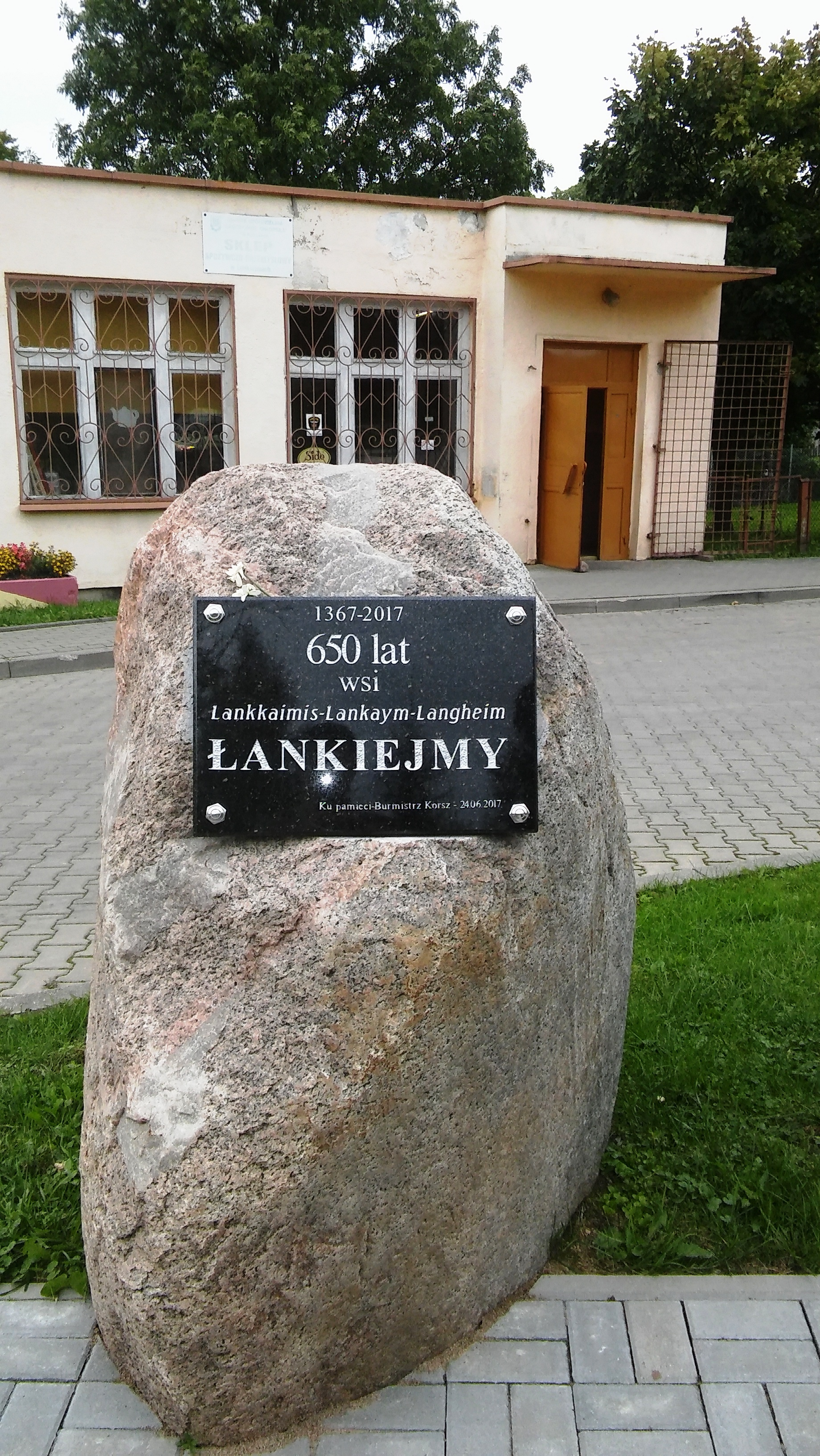 Łankiejmy tablica pamiątkowa 2007